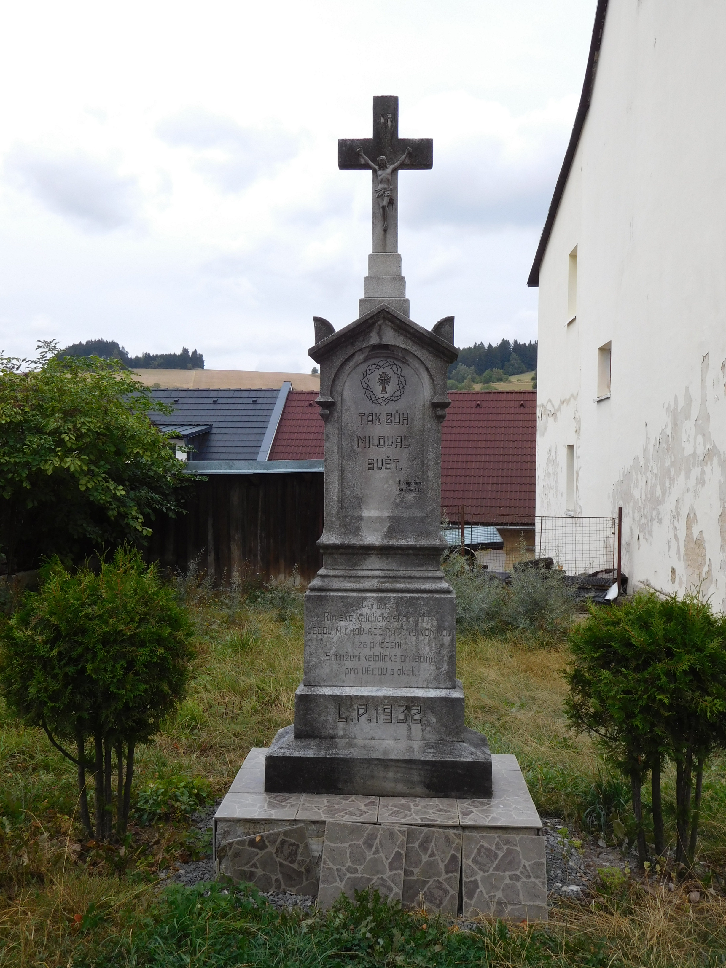 Věcov - krucifix